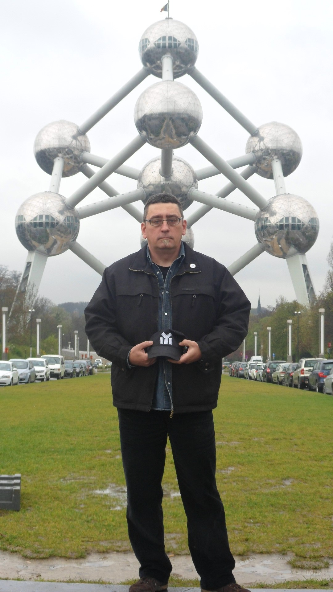 Българският символ на Дуло